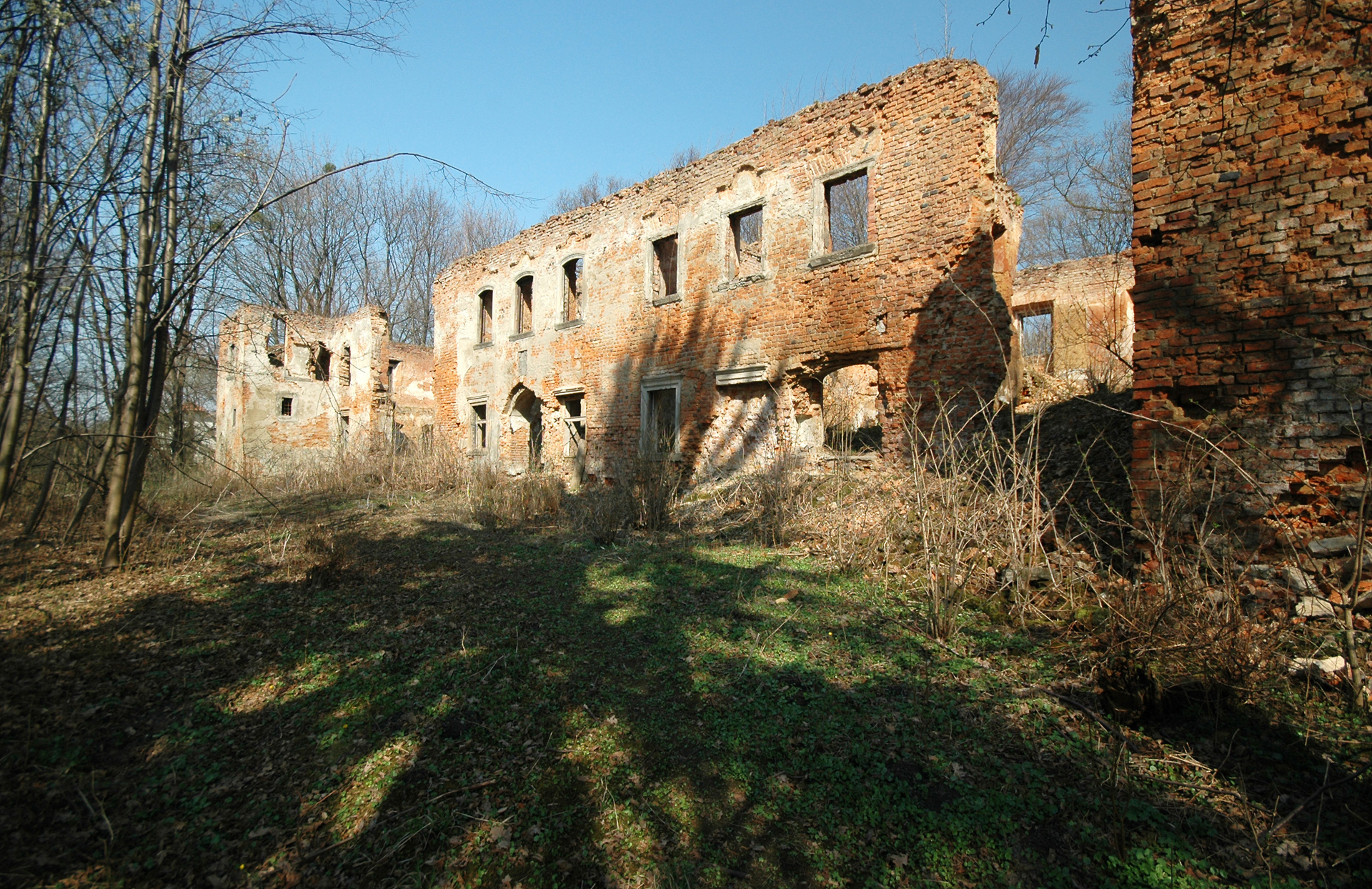 pałac, park Głębowice, Osiek